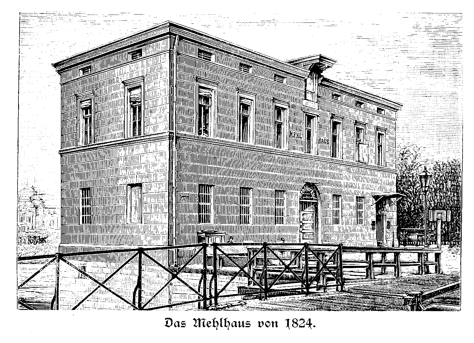 Zweites Mehlhaus auf der Berliner Museumsinsel